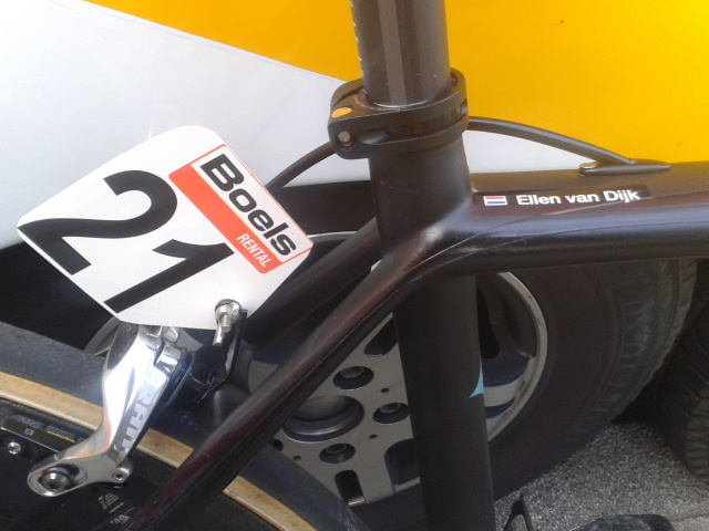 Bicycle of Ellen van Dijk, Ronde van Drenthe